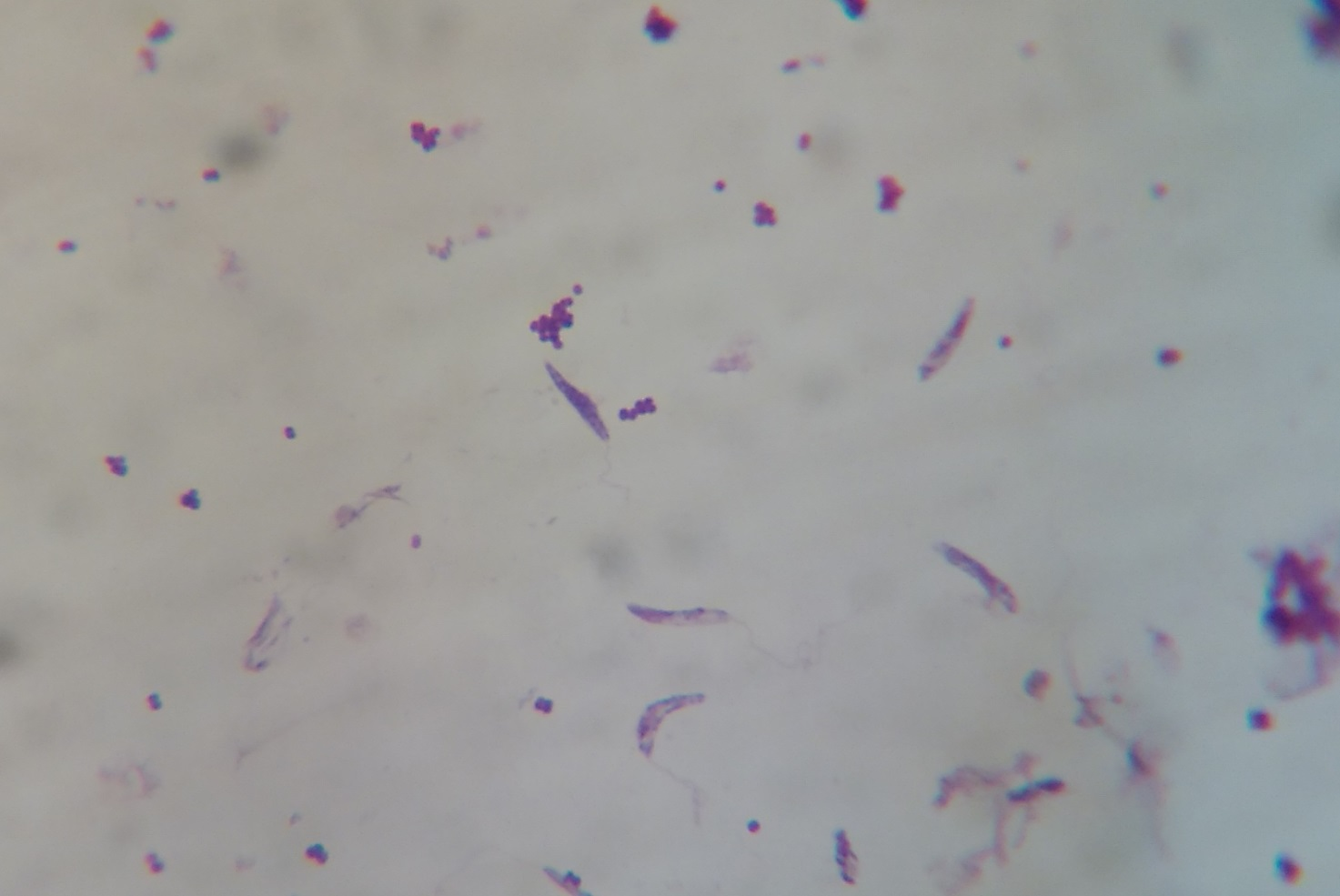 Promastigoti Leshmaniae infantum izgleda mrkve s bičem. Preparat je eksudat miša boja po Giemsa-Romanowskom.